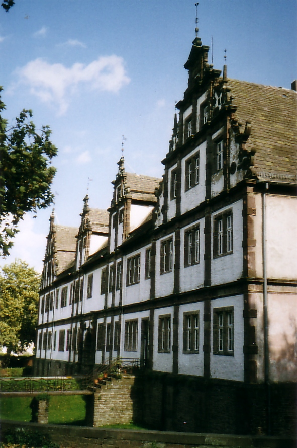 Weserrenaissance-Schloss Bevern, Schrägansicht der Frontseite